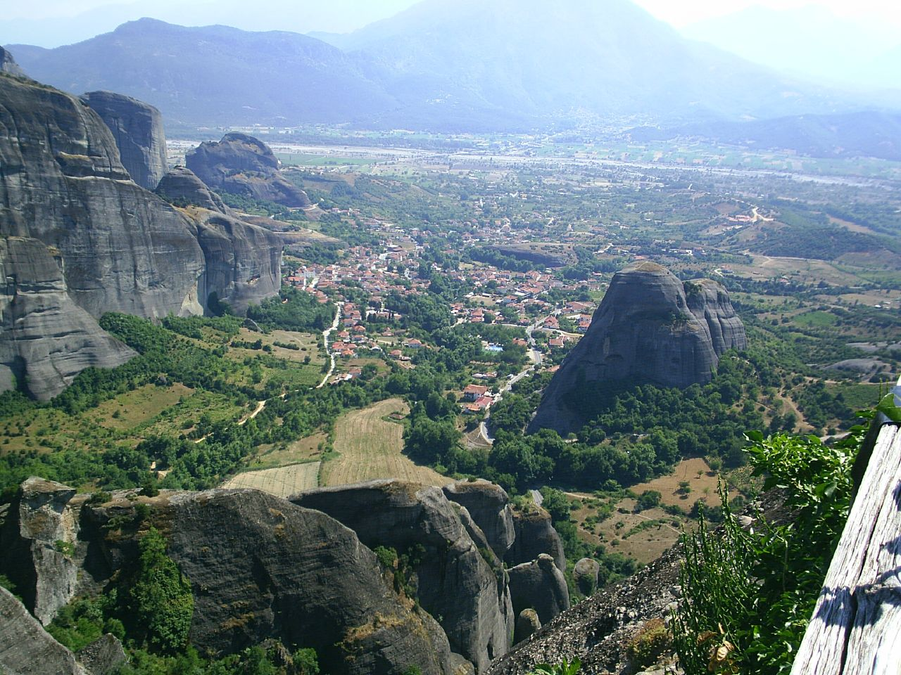 M4011M-1402